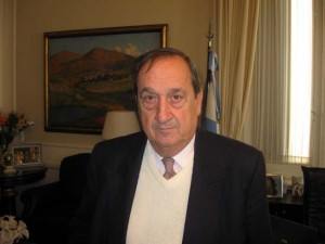 la saque yo